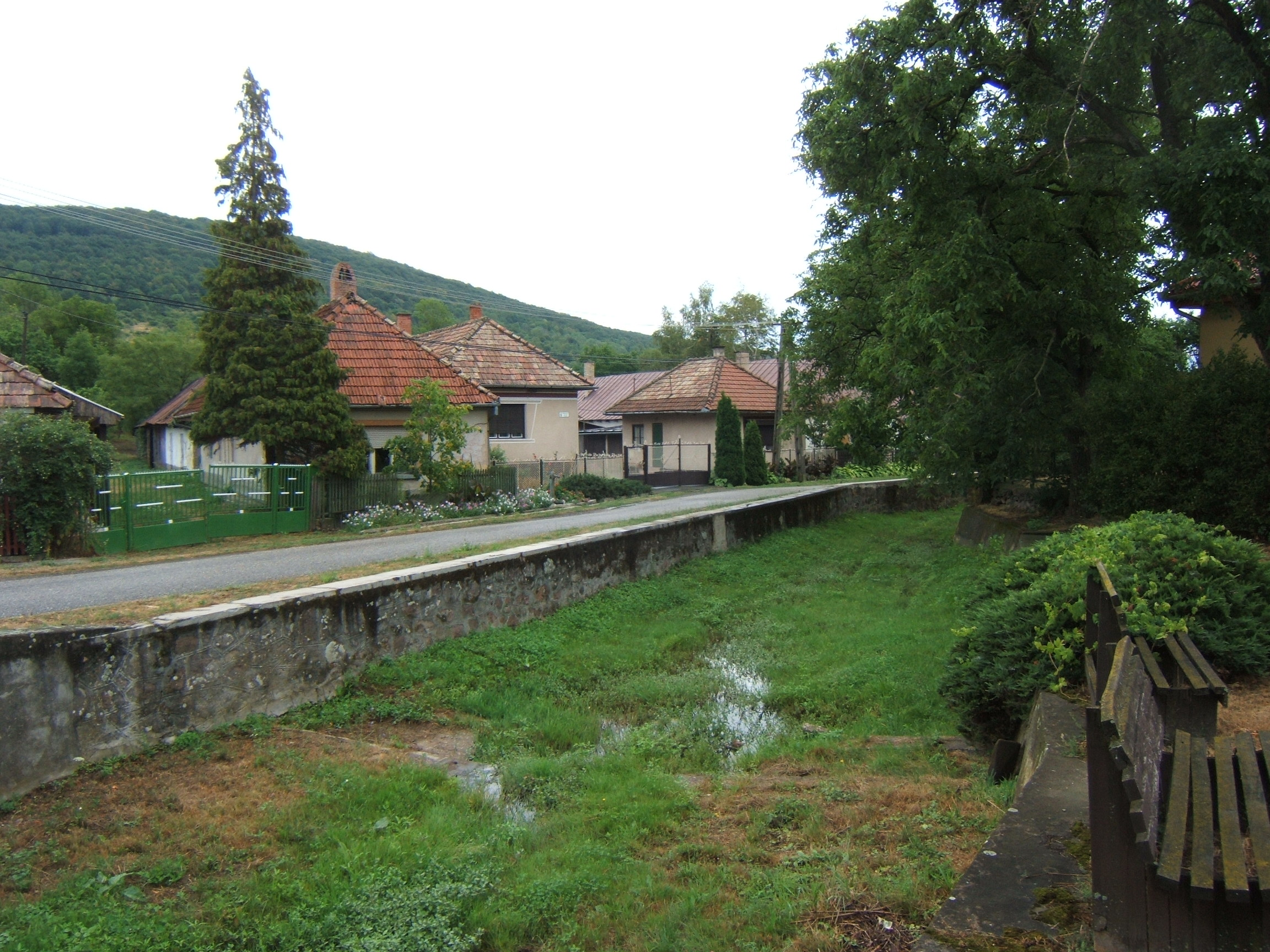 Baskói utcakép